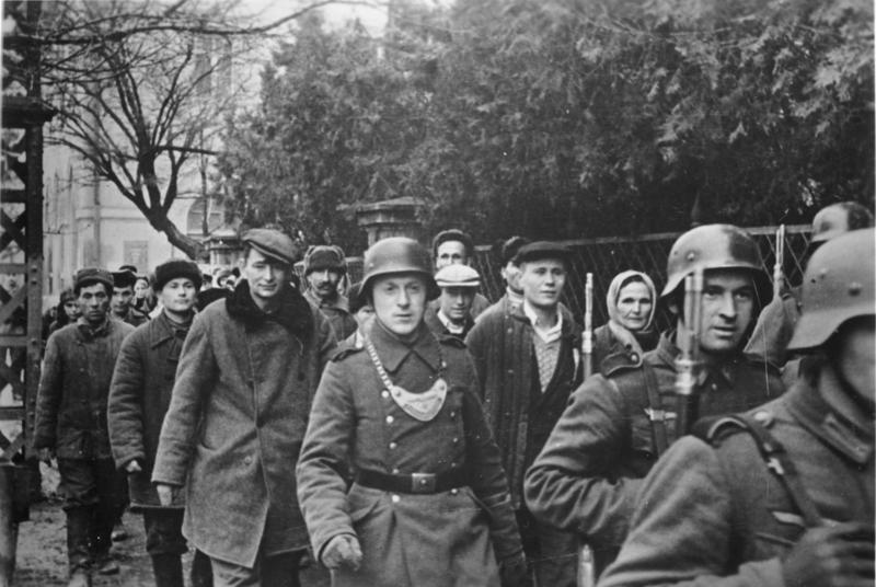 An der Sowjetfront: Razzia in Simferopol. - Personen, deren Ausweise Unklarheiten vorwiesen, werden abgeführt. Januar 1942